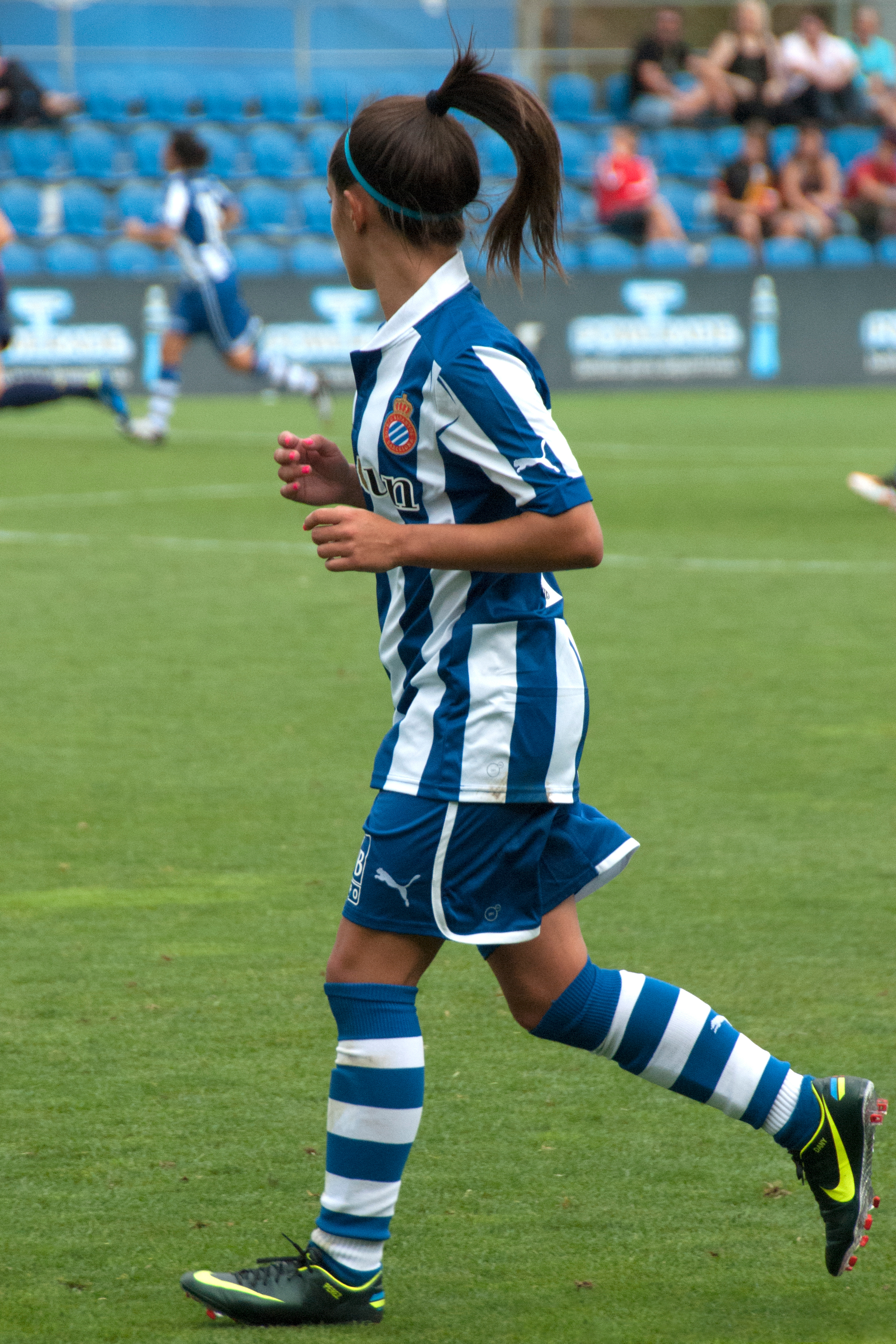 Brenda a un Espanyol-Barça on les periques guanyaren per 2-0.